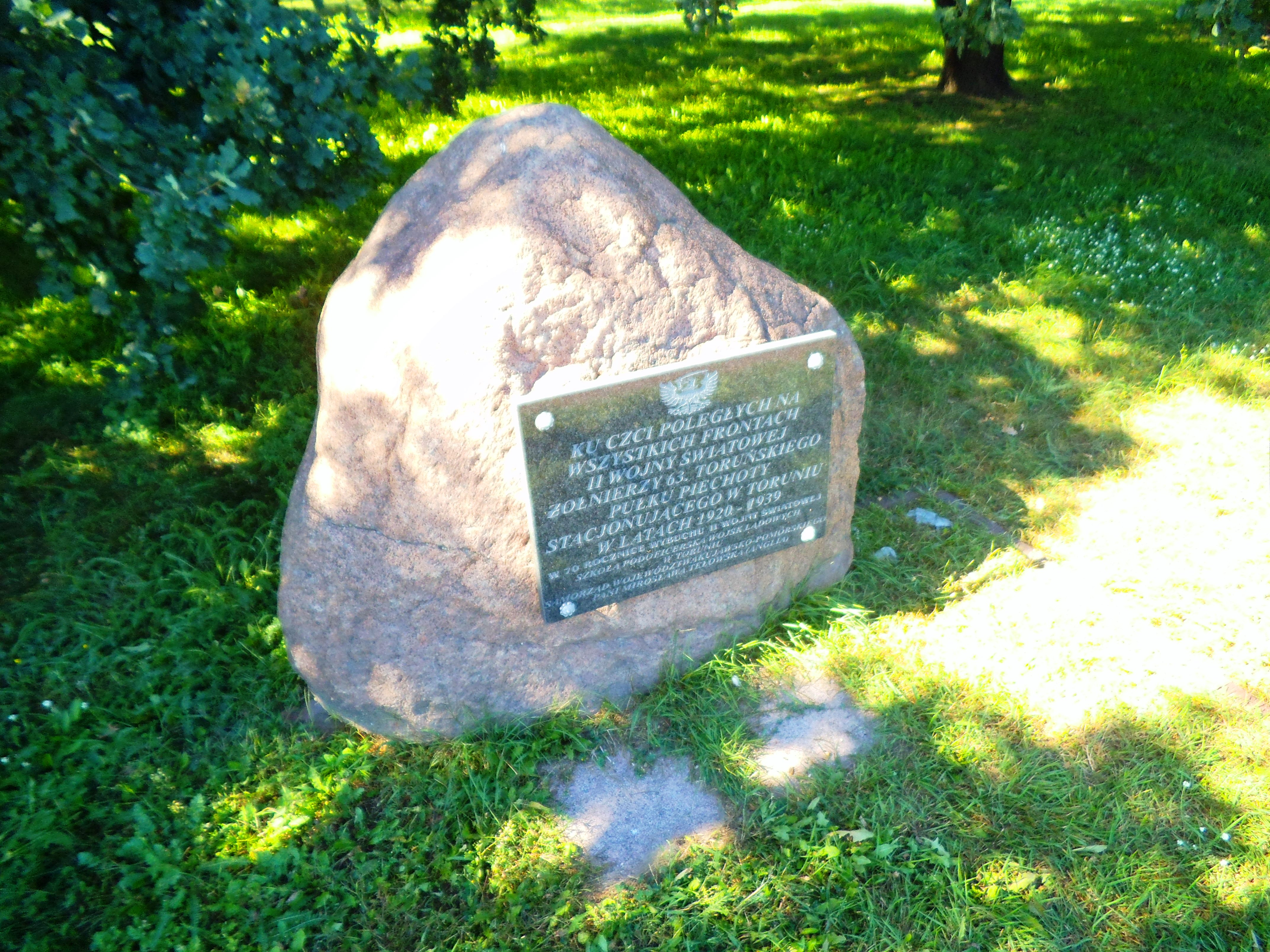 Pomnik 63. Pułku Piechoty w Toruniu